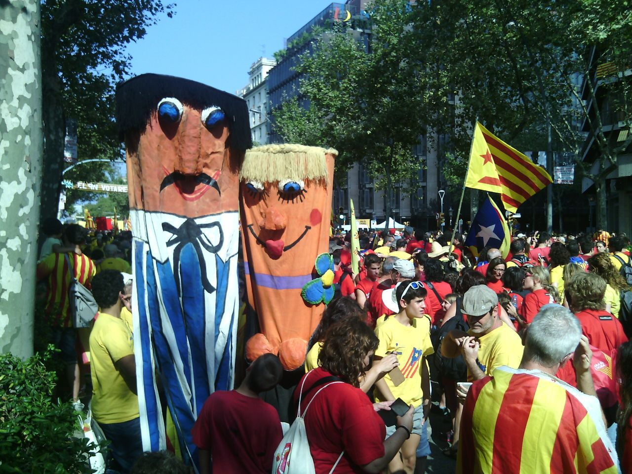 Els Gegants de Ribes Altes, Rovelló i Correjola.